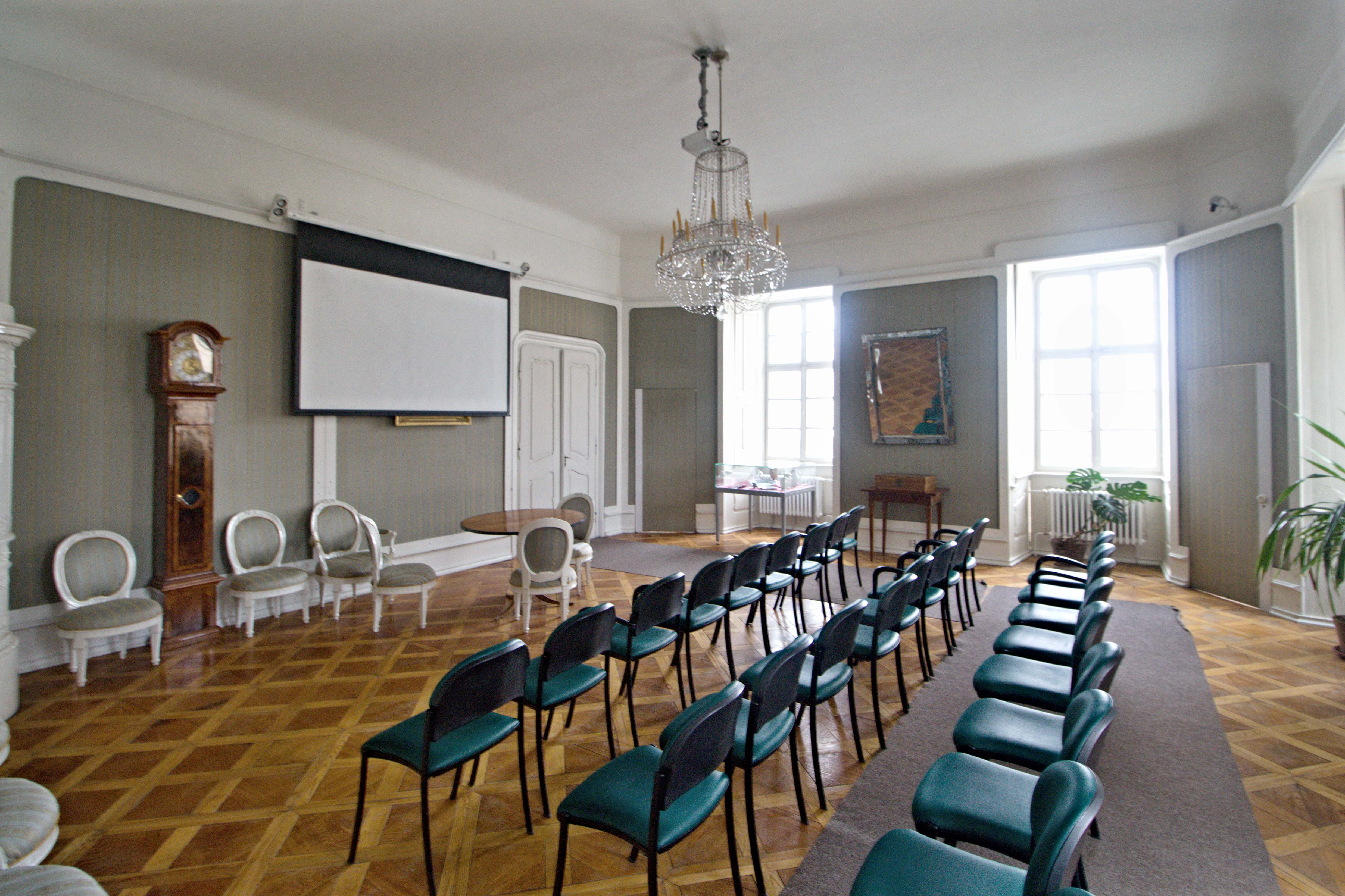 Regionální muzeum & galerie - zámek Jičín